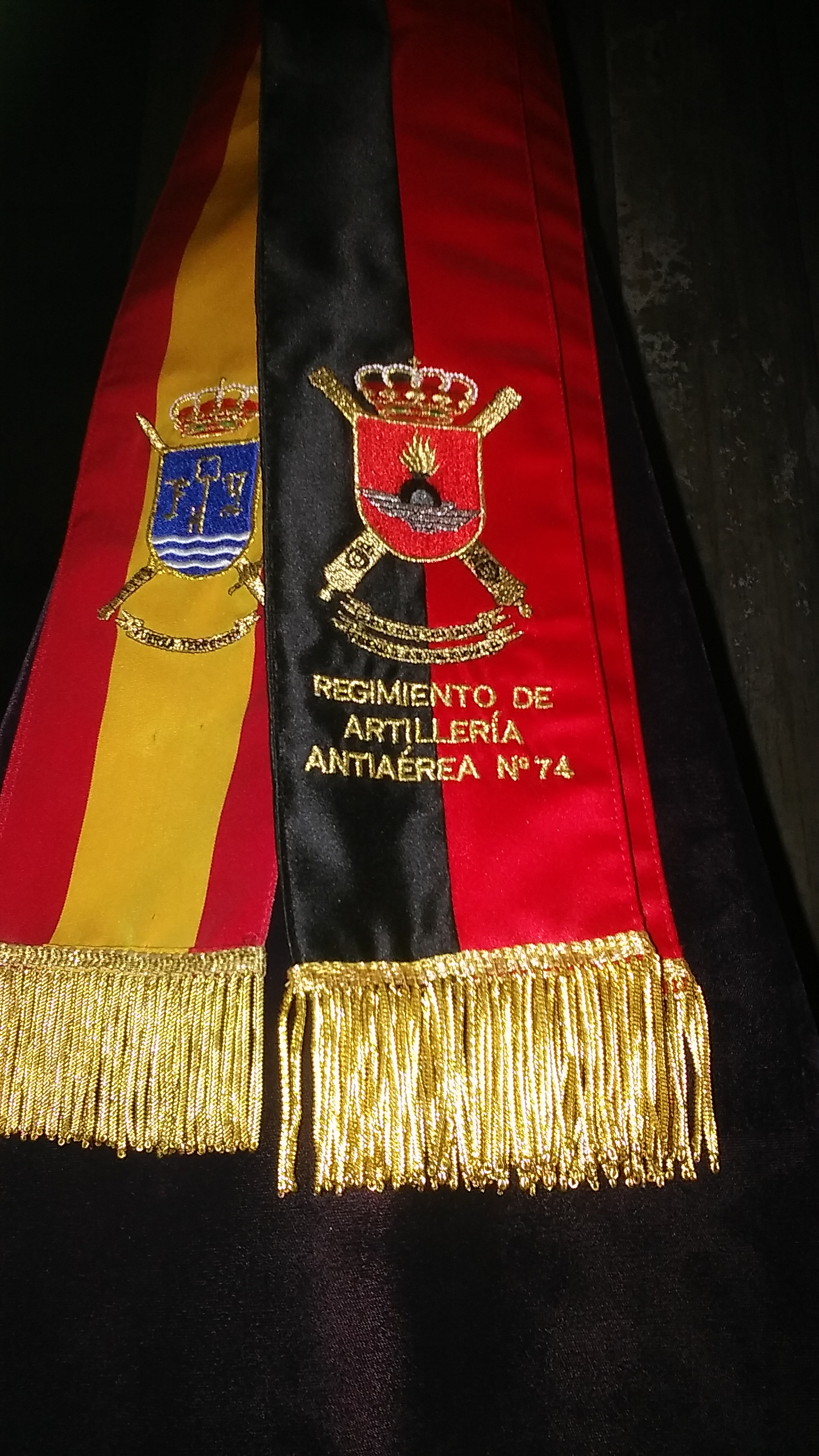 Iglesia conventual de los Padres Capuchinos en Jerez de la Frontera (Andalucía, España) en la Semana Santa de 2016 This is a photography of a Folklore festival in Spain (Wikidata id Q6124533).